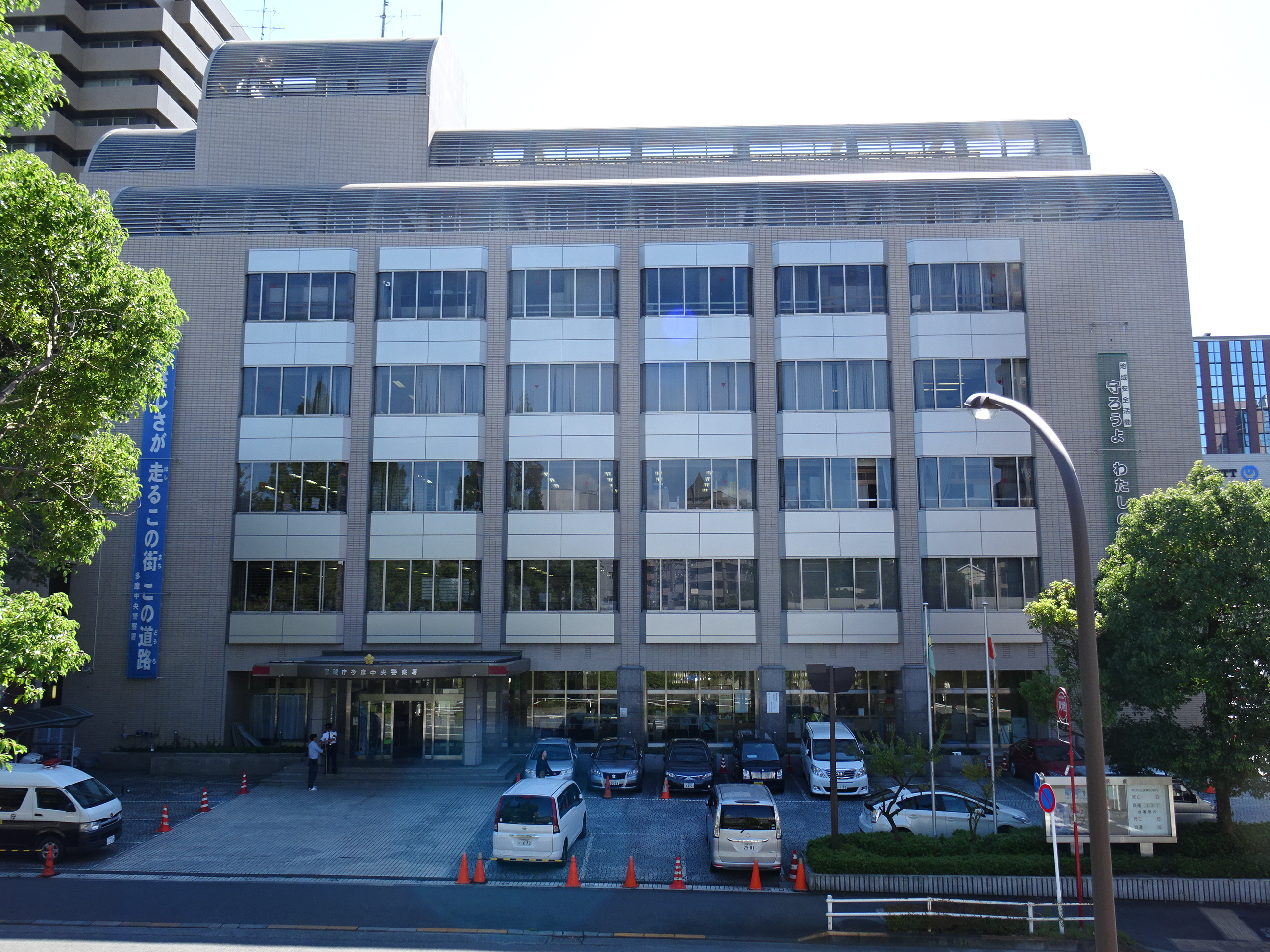 多摩市にある警視庁多摩中央警察署（2015/10/08撮影）